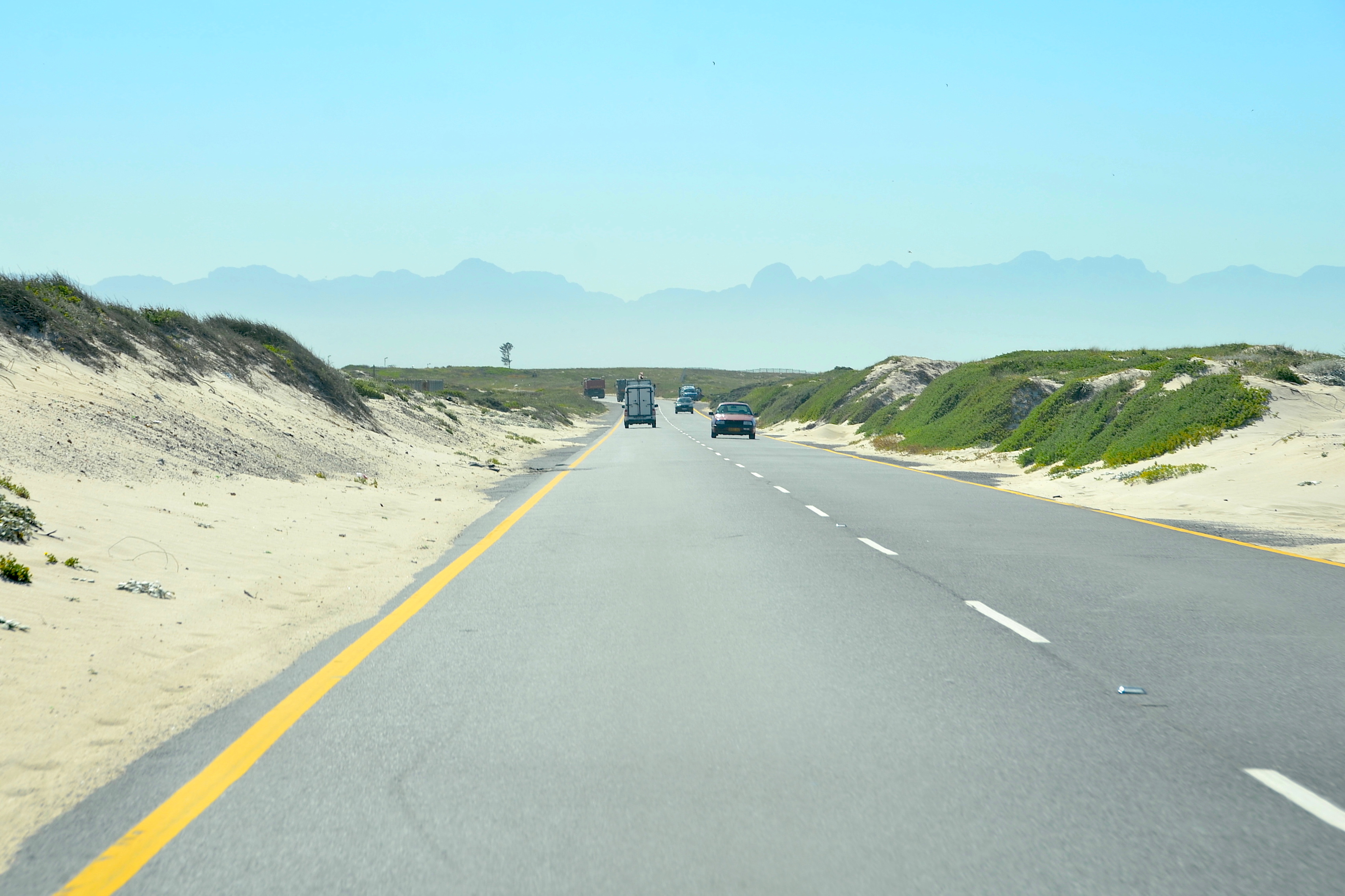 Baden Powell Drive, R310 in Südafrika, Blick auf die Hottentots Holland Berge